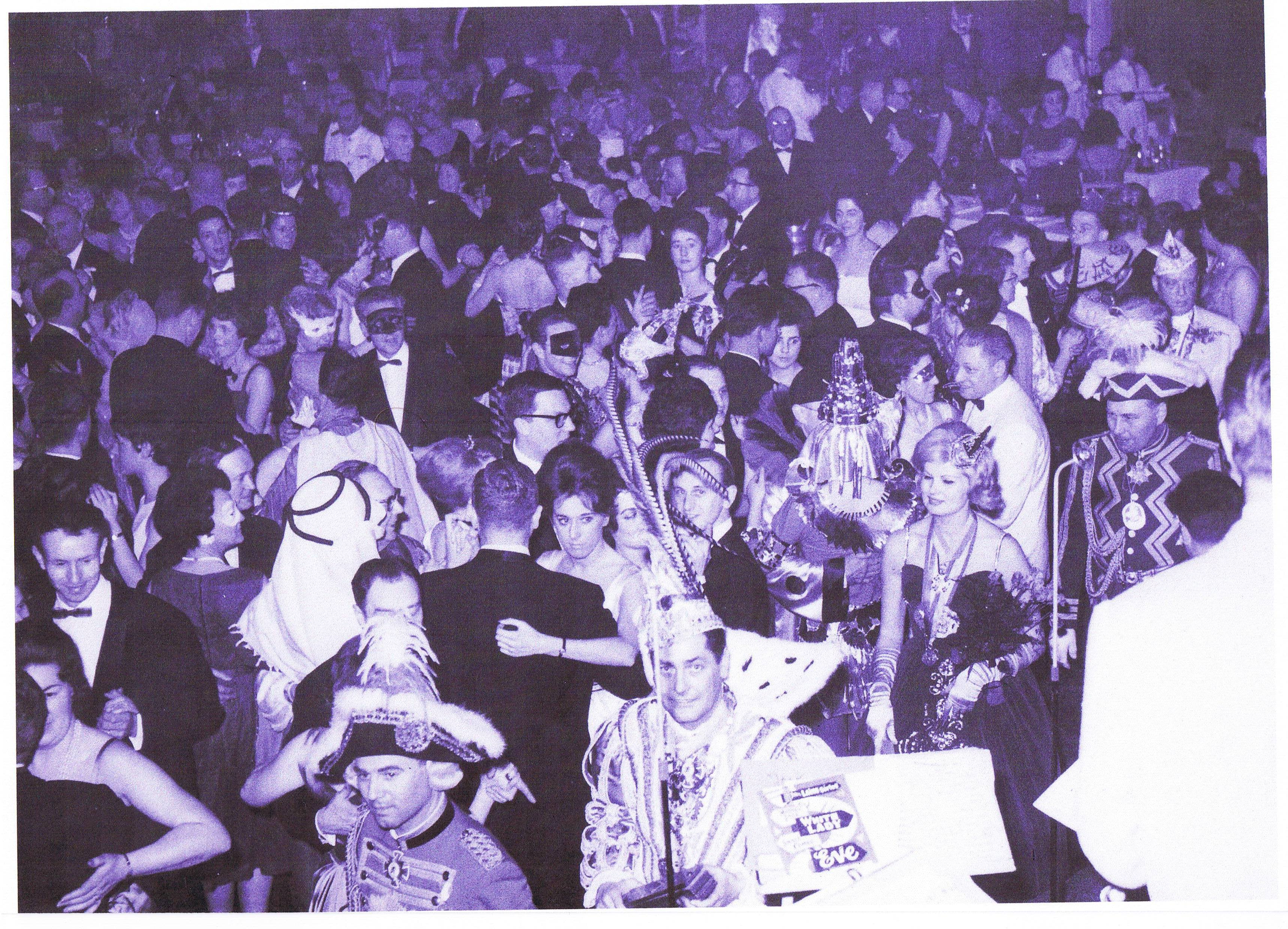 Le Bal du rat mort